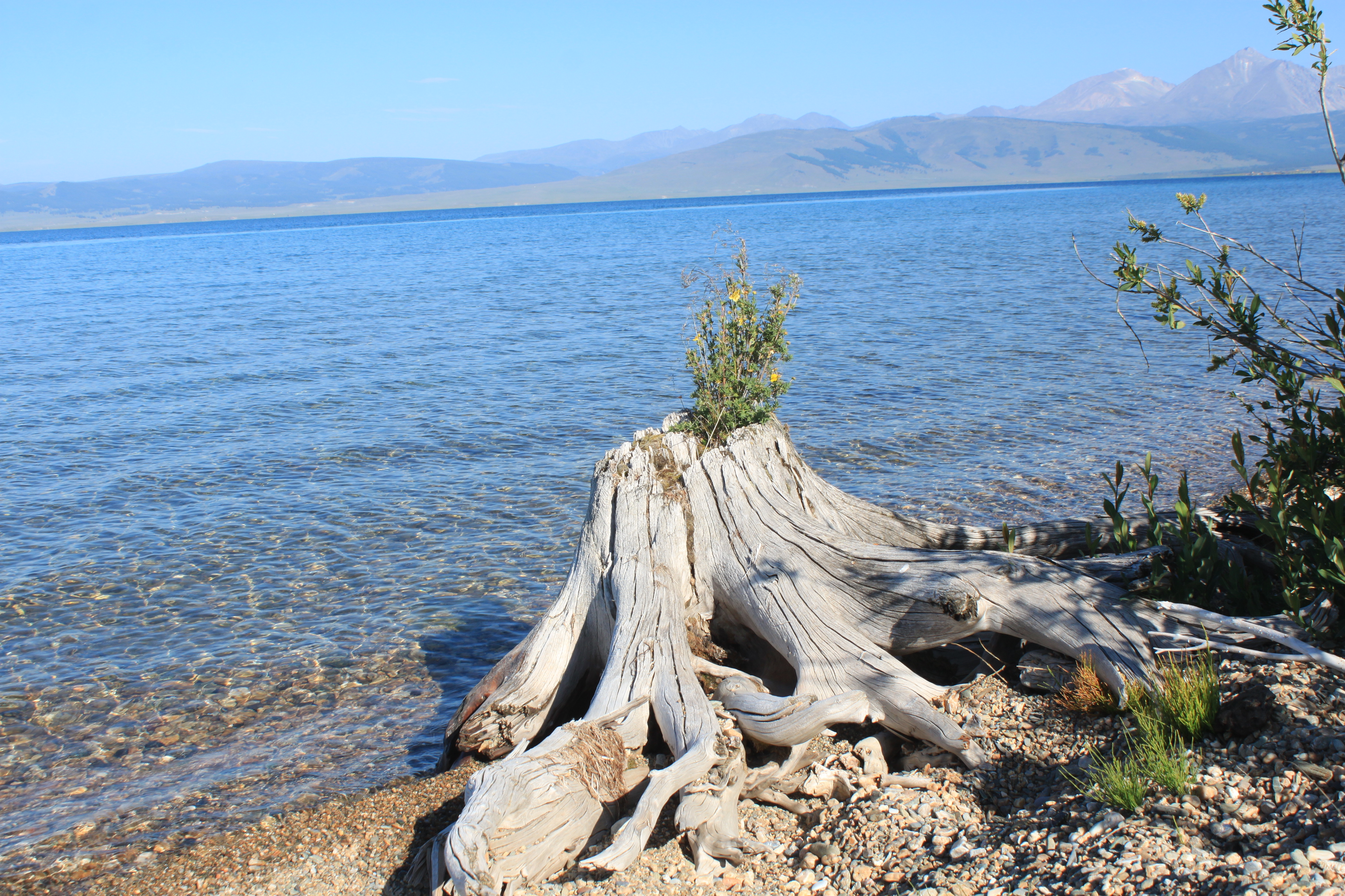 Монгол: Picture of lake khuvsgul